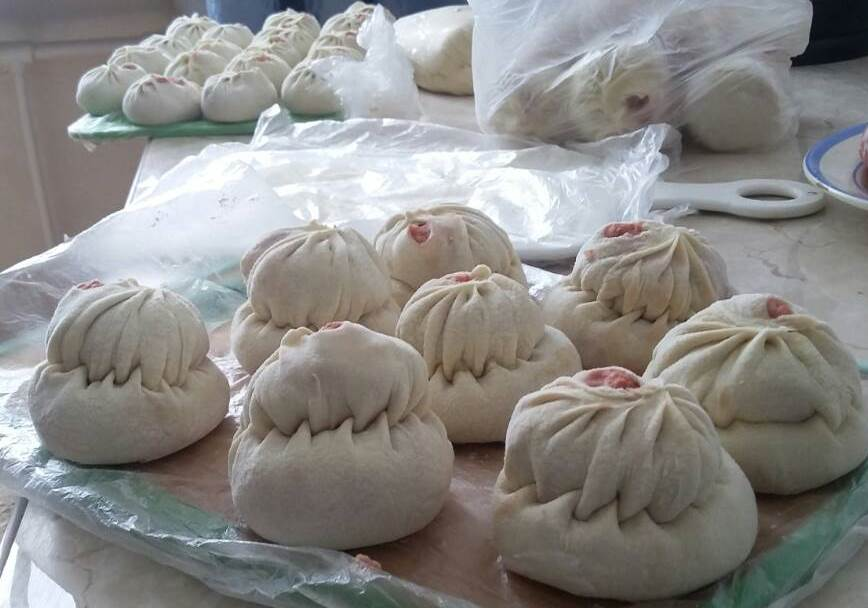 Double buuz. Buryatia, Russia